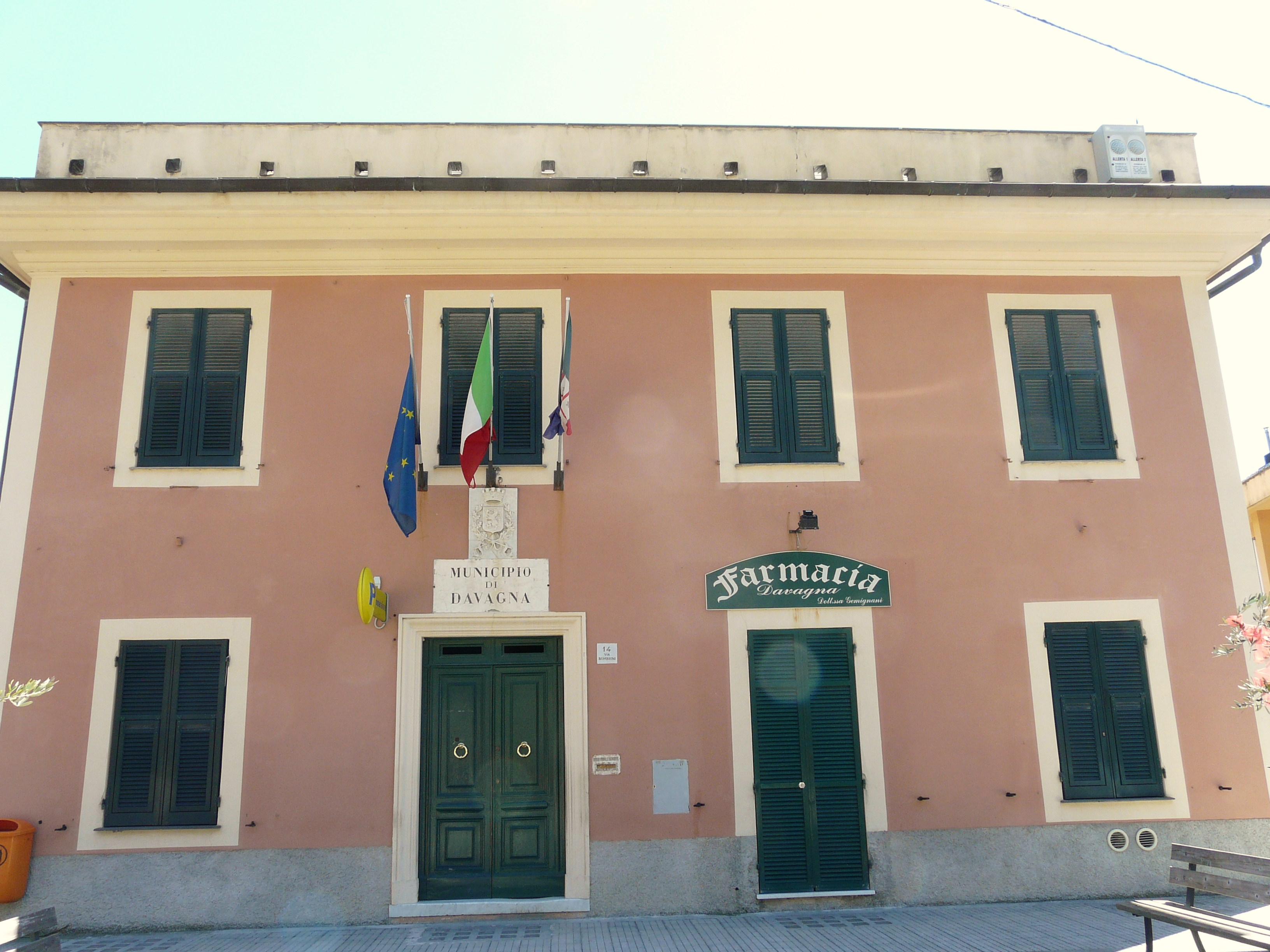 Municipio di Davagna, Liguria, Italia